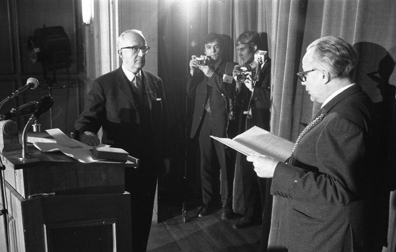 Verleihung des Robert-Schuman-Preises an Prof. Walter Hallstein durch den Rektor der Uni Bonn, Prof. Partsch Information added by Wikimedia users.Hallstein erhielt den nach dem ehemaligen französischen Außenminister benannten Robert-Schuman-Preis